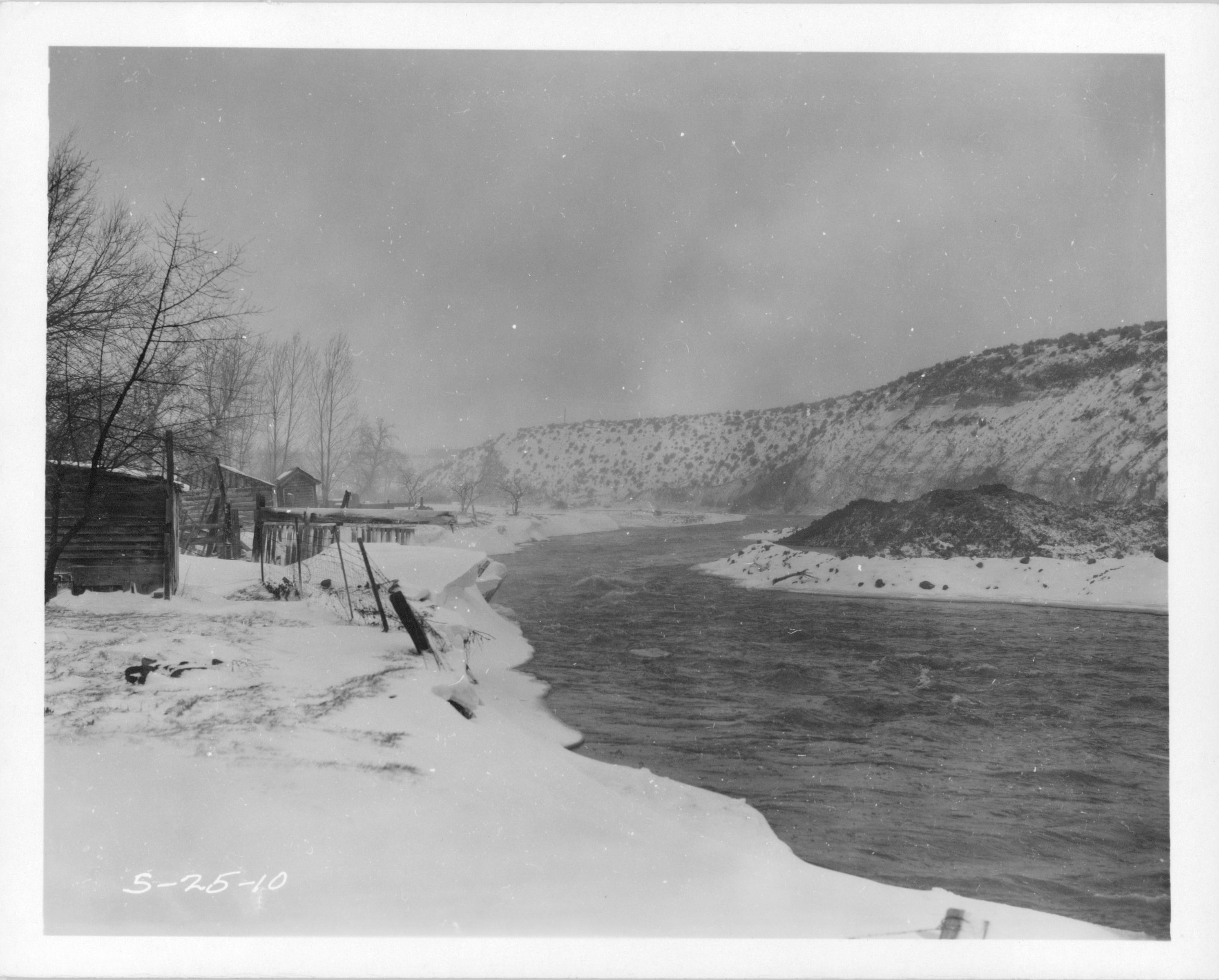 Freeze of December 1964